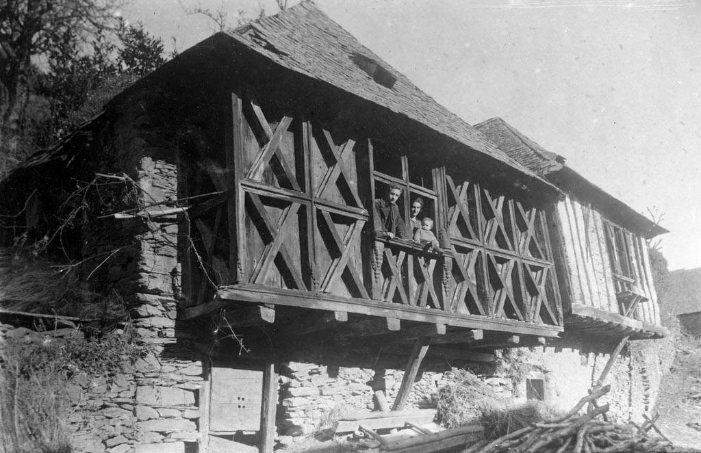 Balconada de fusta de Casa Toquera amb família a la finestra. Juli Soler i Santaló (Entre 1890 i 1914)